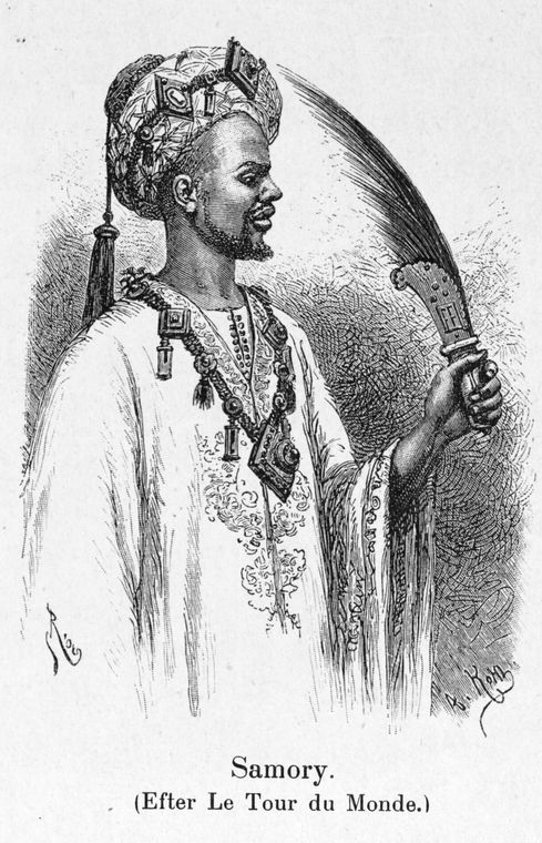 "Samory", dessin d'Edouard Riou déjà publié dans Le Tour du Monde